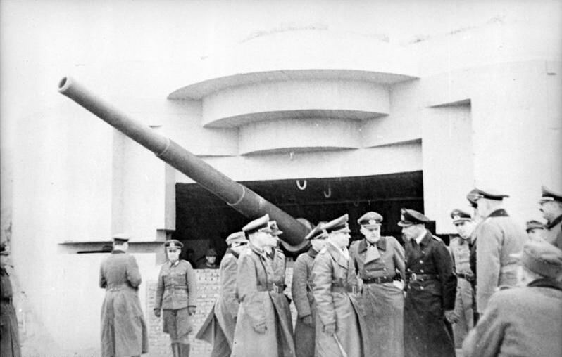 Generalfeldmarschall Rommel an der Biskaya. Besichtigung des südlichen Teiles des Atlantikwalls.